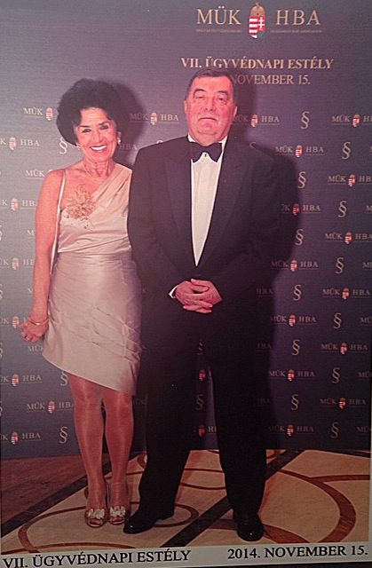 Lovag Dr. Gábor László, a Magyar Ügyvédek Kölcsönös Biztosító Egyesületének (MÜBSE) ügyvezető igazgatója, és felesége Dr. Gábor Lászlóné (Gábor Zsuzsa) úrnő a Magyar Ügyvédi Kamara (MÜK) VII. Ügyvédnapi Estélyén, a Corinthia Grand Royal Hotelben, Budapesten.